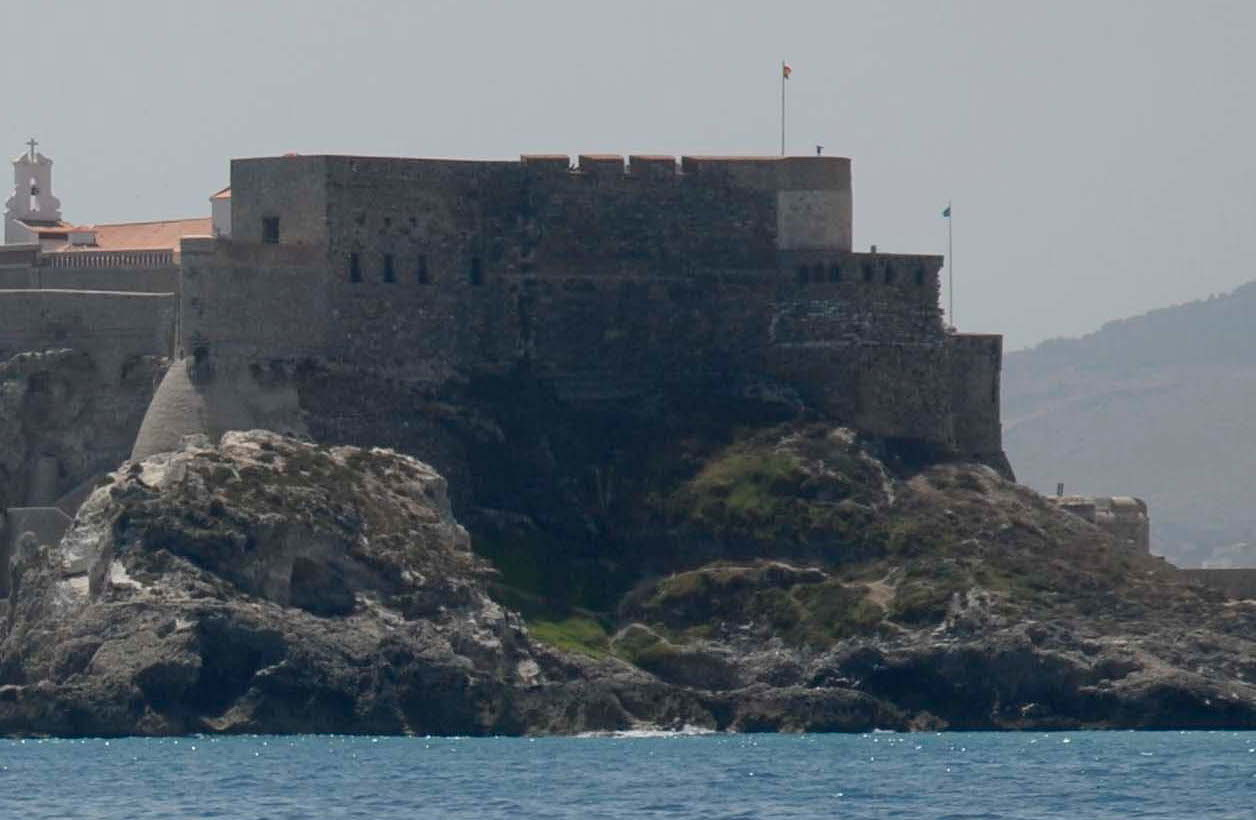 Vista del baluarte de la Concepción de Melilla desde el mar